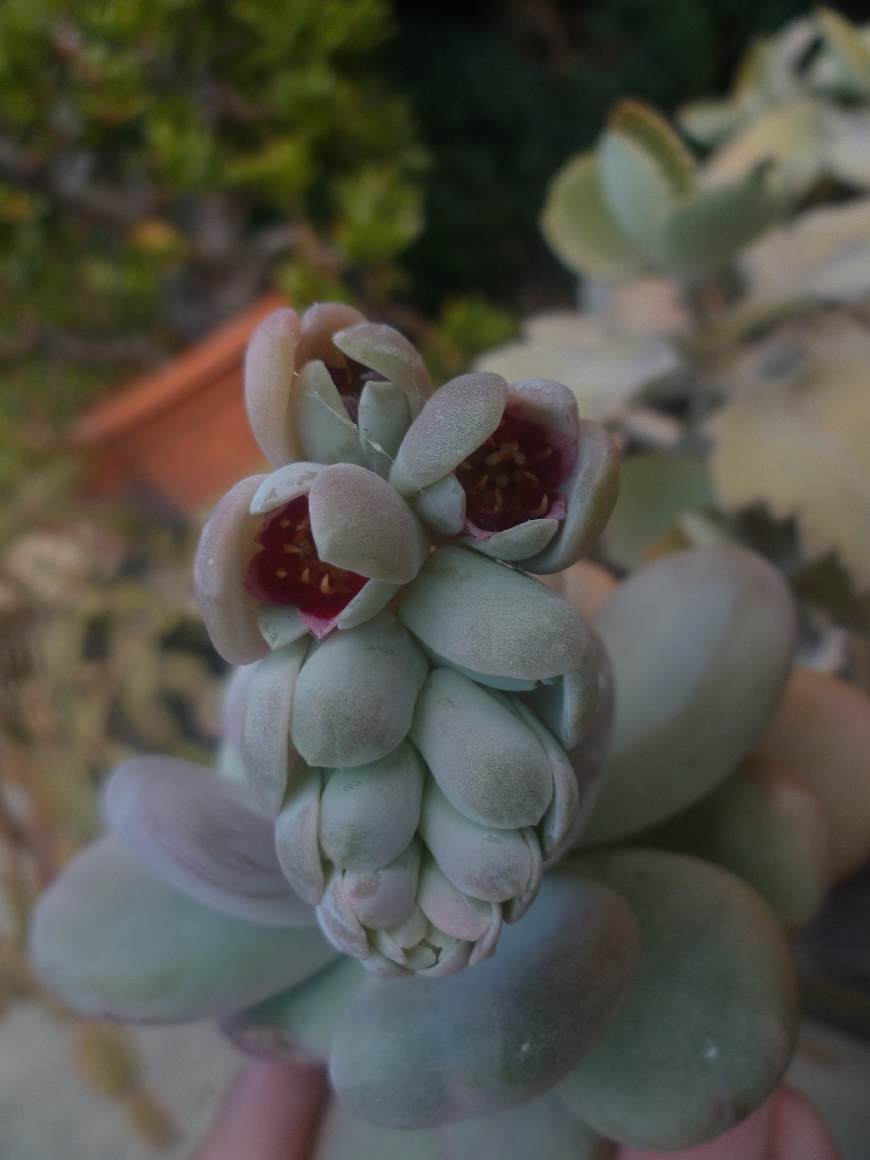 inflorescence de Pachiphytum bracteosum